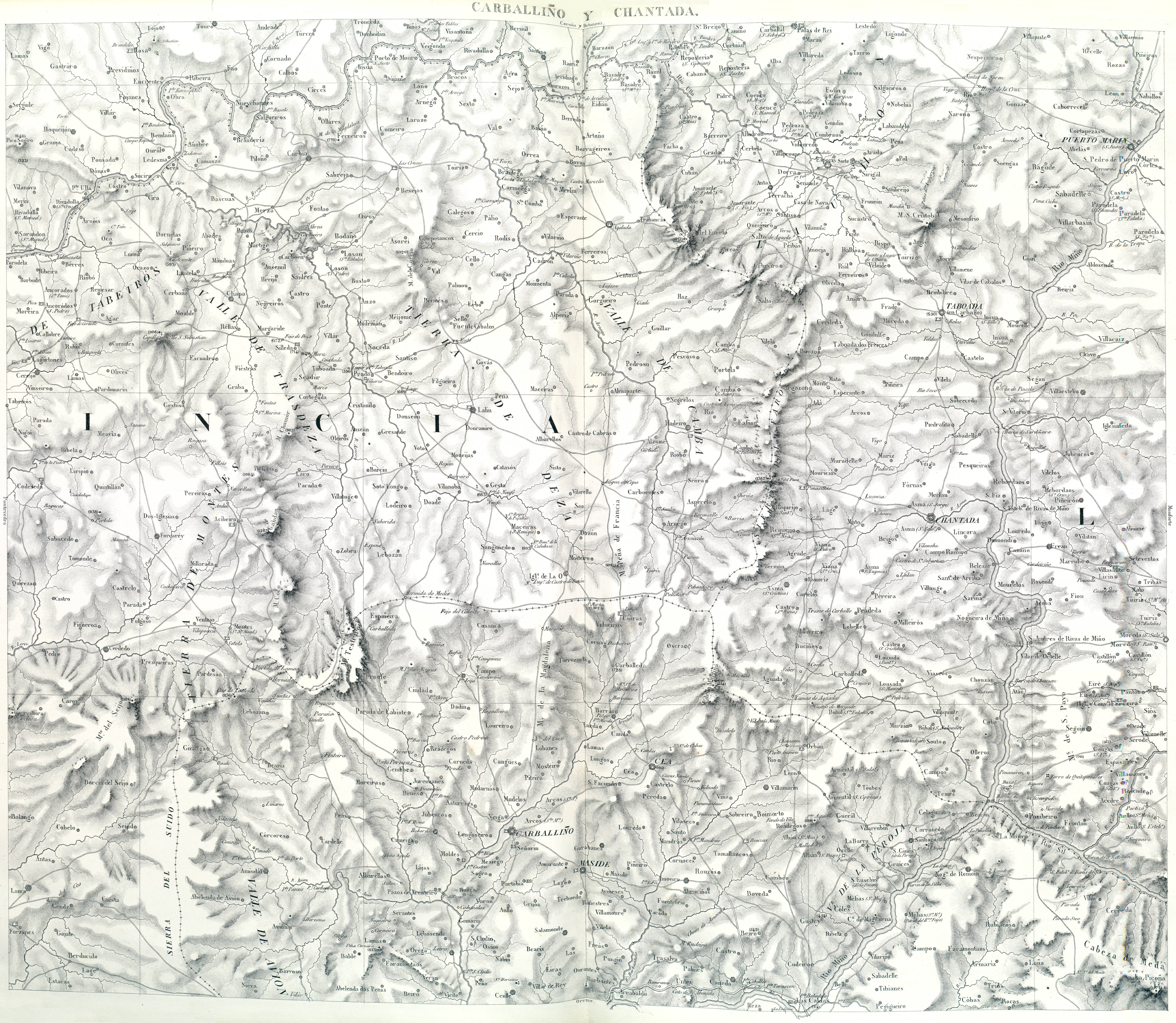 = CARTA GEOMETRICA D E G A L I C I A Dividida en sus Provincias de Coruña, Lugo, Orense, Pontevedra; y subdividida en Partidos y Ayuntamientos: PRESENTADA EN 1834 A S.M. LA REINA GOBERNADORA Doña Maria Cristina de Borbon por su Secretario de Estado y del despacho de lo Interior LEVANTADA Y CONSTRUIDA EN LA ESCALA DEL CIENMILESIMO POR EL DR. D. DOMINGO FONTAN, Director del Observatorio Astronomico de Madrid, Diputado á Cortes. Individuo de la Academia de la Historia y de la Sociedad de Geografia de Paris, Ex-profesor de Matematicas sublimes y de Mecanica industrial en la Ciudad de Santiago. Grabada bajo la dirección del Autor en 1845 POR L. BOUFFARD No se grabó la división de los Partidos y Ayuntamientos en razon de su interinidad.